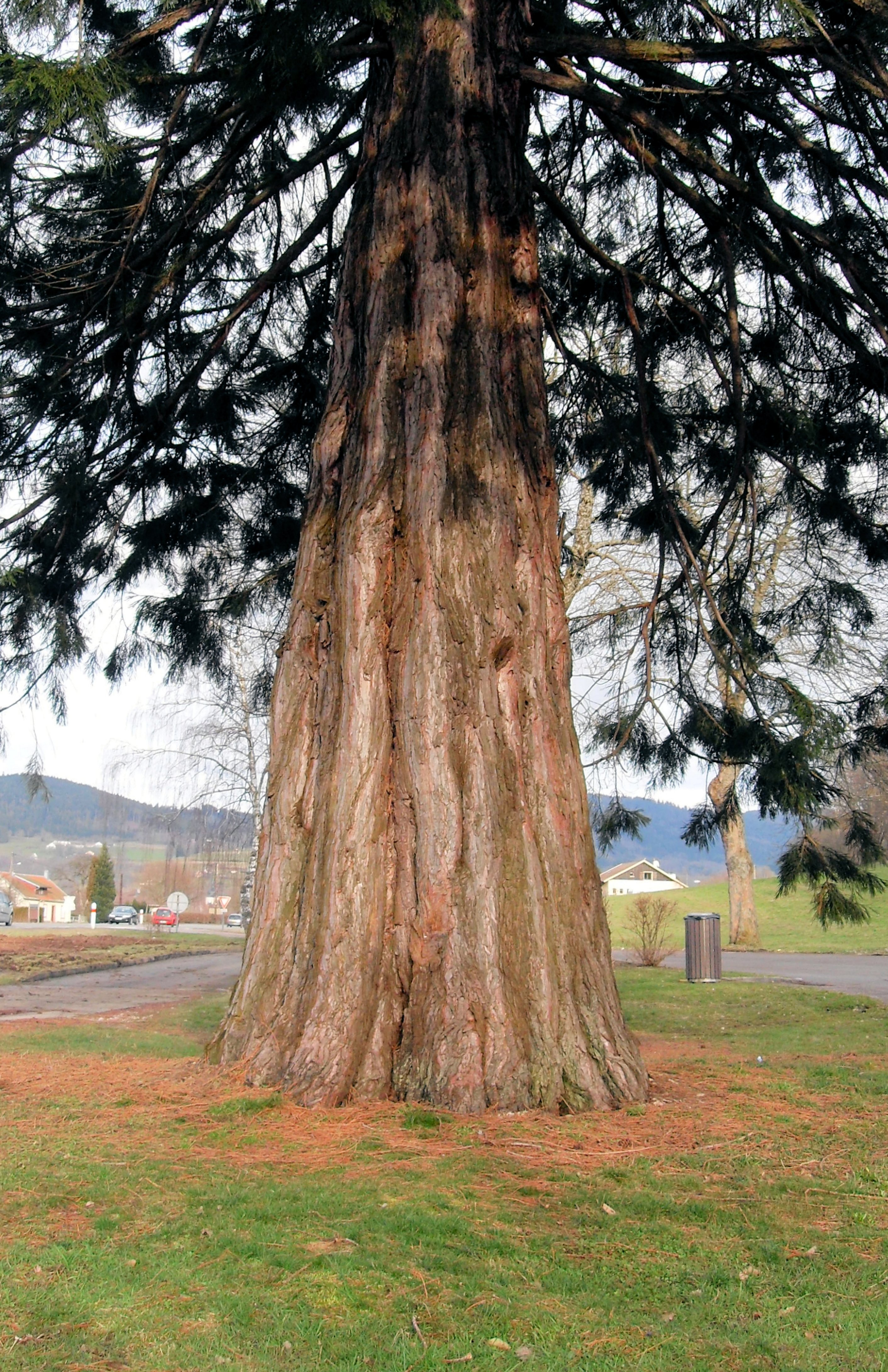 Séquoia géant entre Anould et Fraize